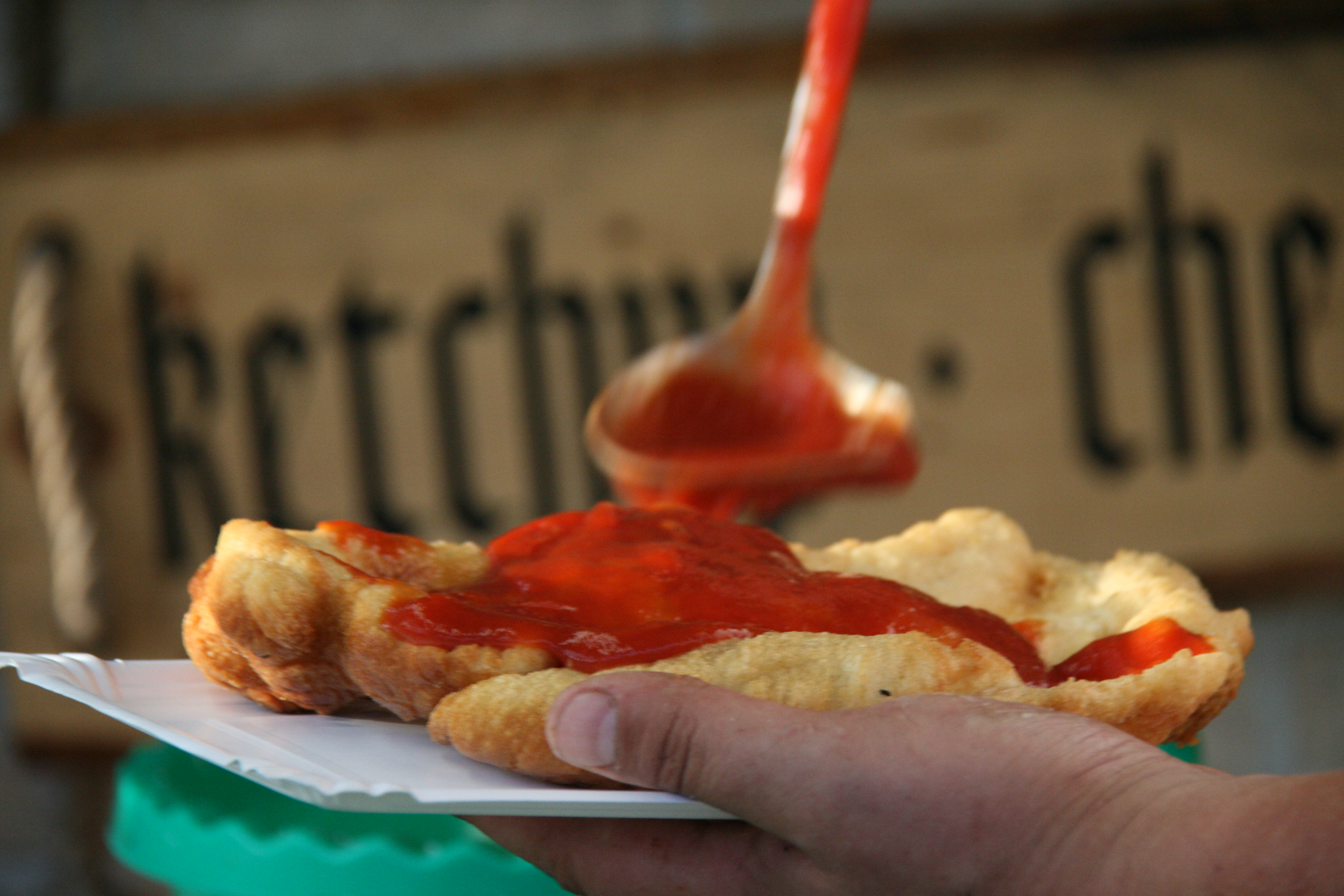 Expresné langoše with Tomato sauce